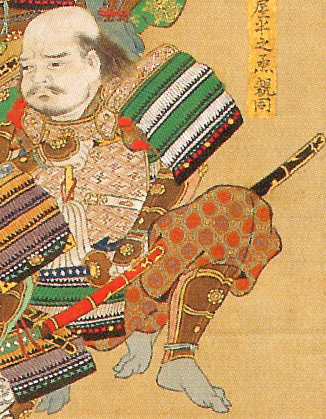 蜂屋貞次の肖像。